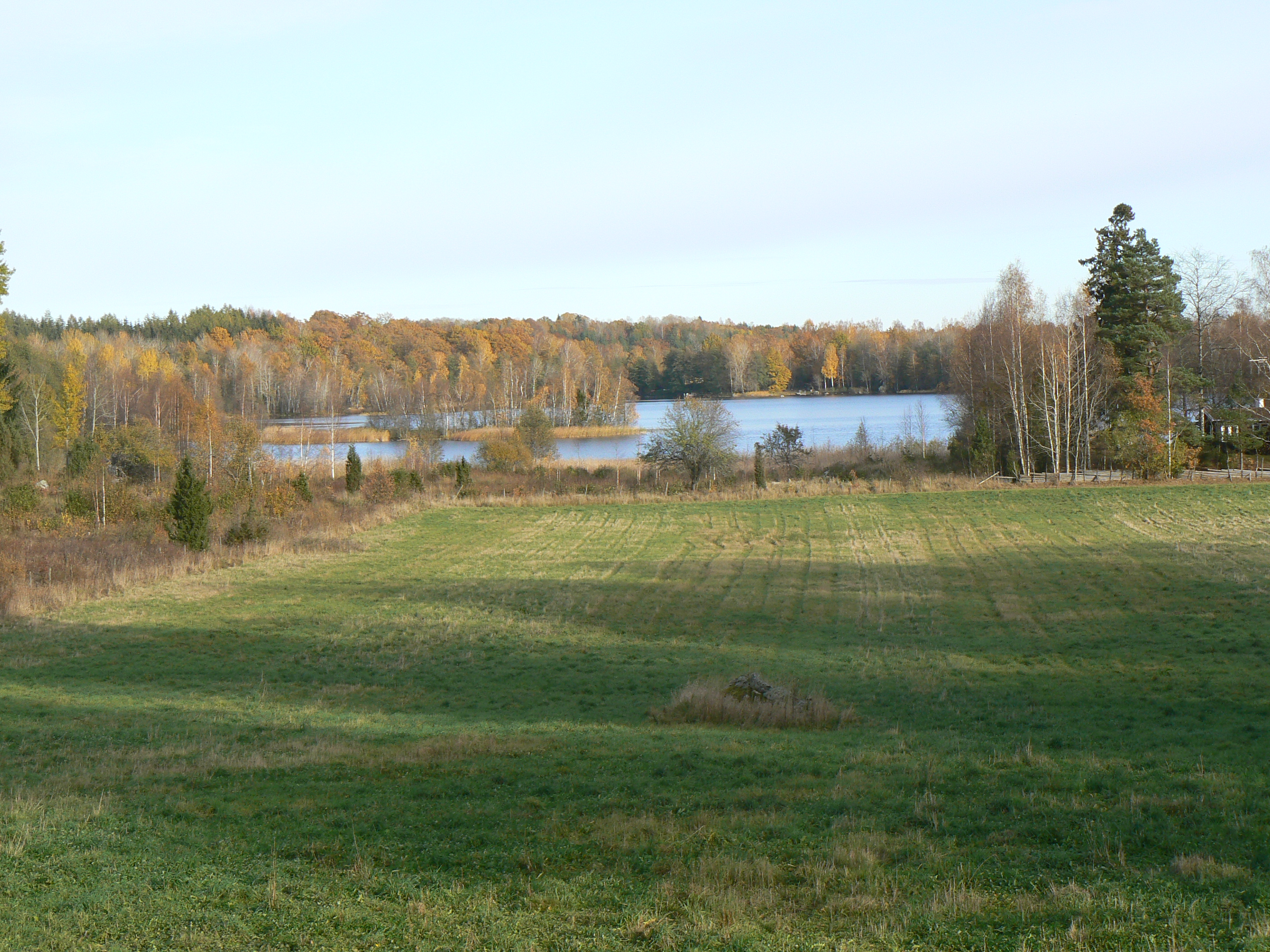 Lake Lilla Rängen in Linköping Municipality, Sweden.